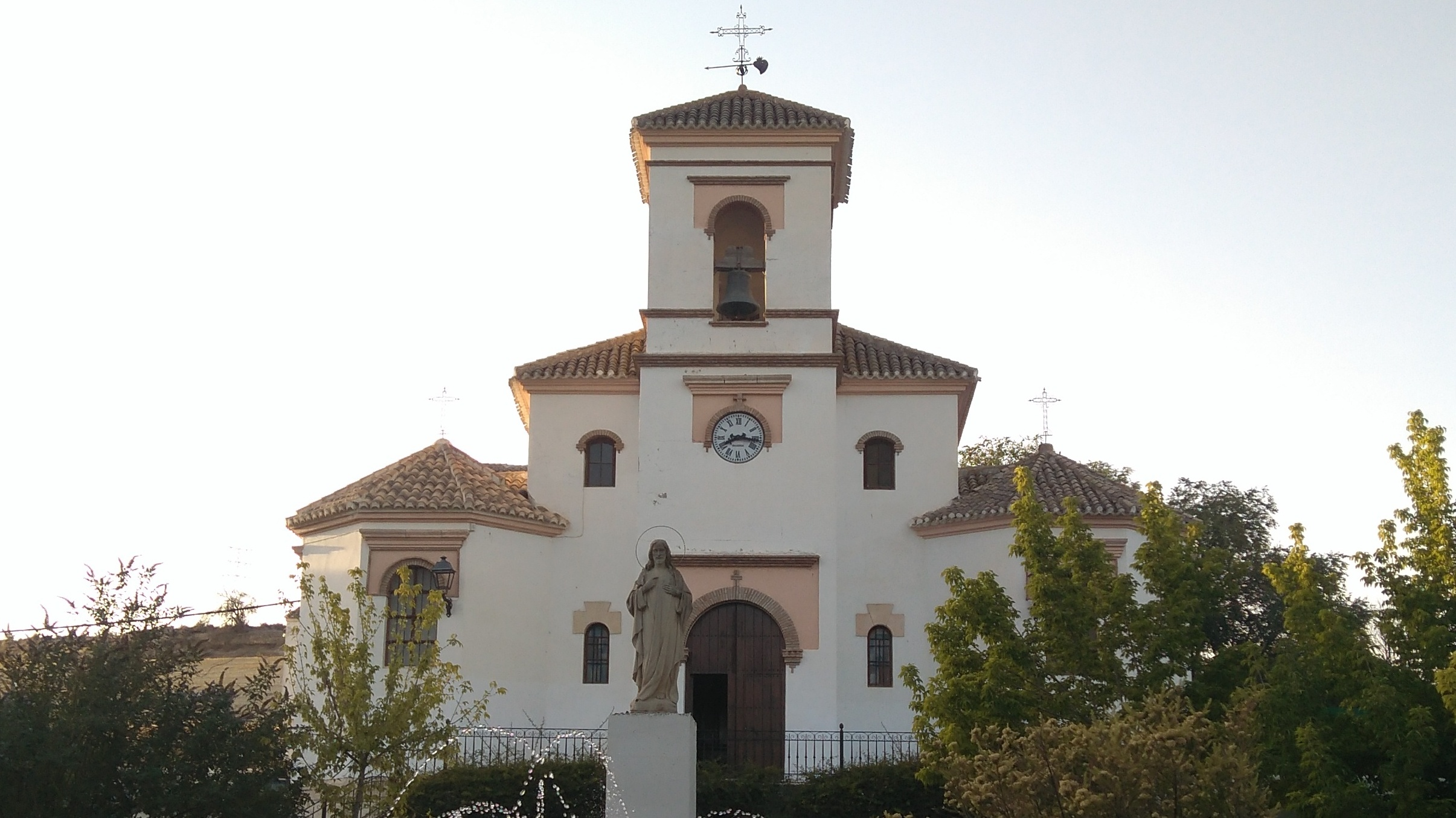 Iglesia de San Sebastián en la Plaza Alfonso XII de Arenas del Rey, Granada.